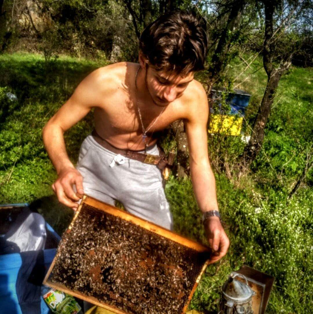 Инж. Иван Белишки-професионален пчелар, член на НБПС и специалист по болестите по пчелите. Най-младия професионален пчелар в България, номиниран за "Пчелар на годината" за 2016г.